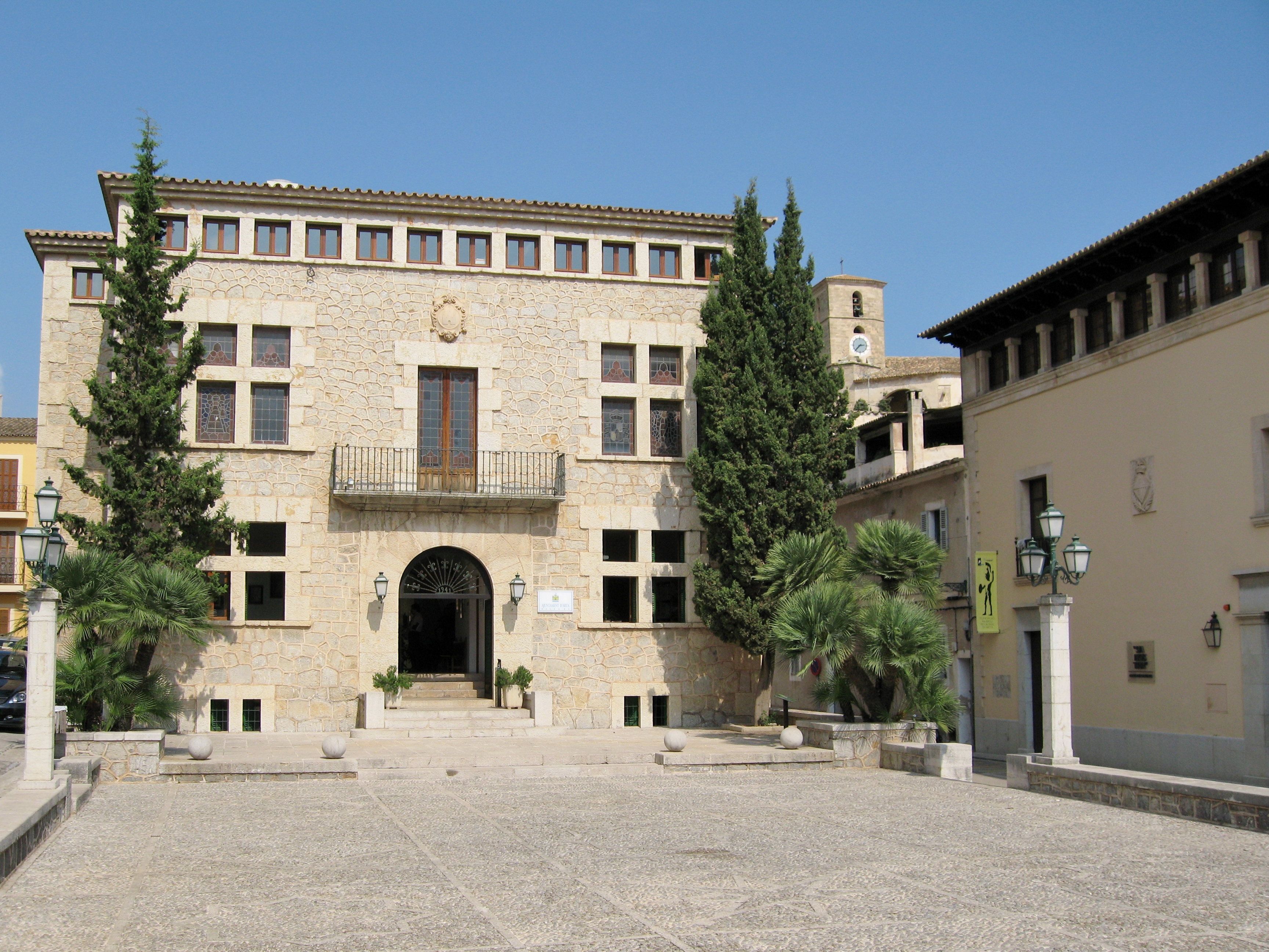 Ajuntament d'Artà, Plaça de l'Ajuntament, Artà, Mallorca, Spain